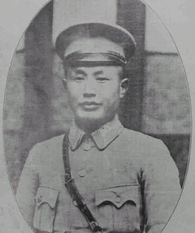 北伐期の何応欽